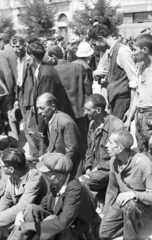 Scherl; Griechenland: In Übereinstimmung zwischen den deutschen und griechischen Stellen werden jetzt die Juden in Griechenland erfasst und einer nutzbringenden Arbeit zugeführt. Kriegsberichter Dick, Juli 1942